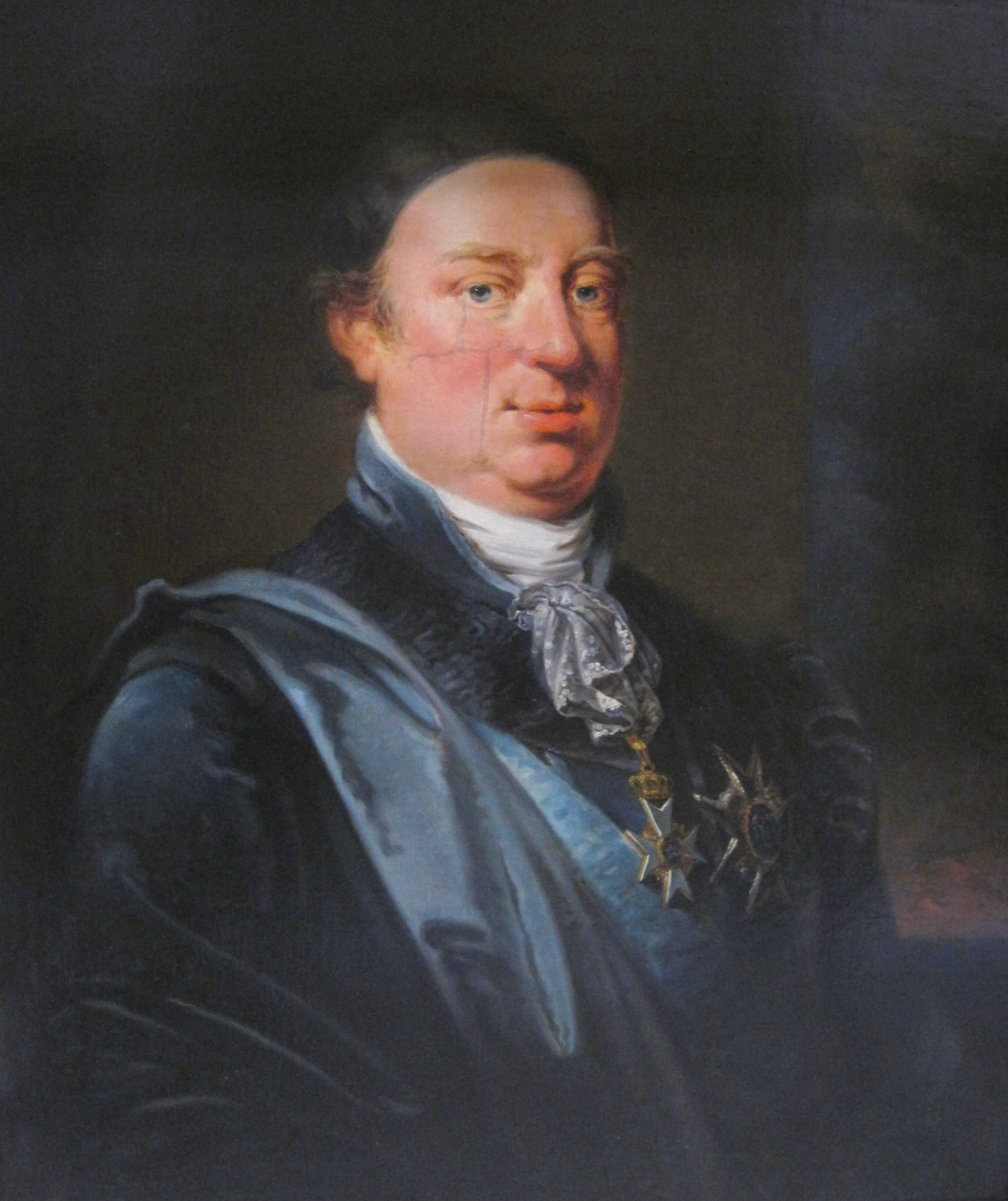 detail